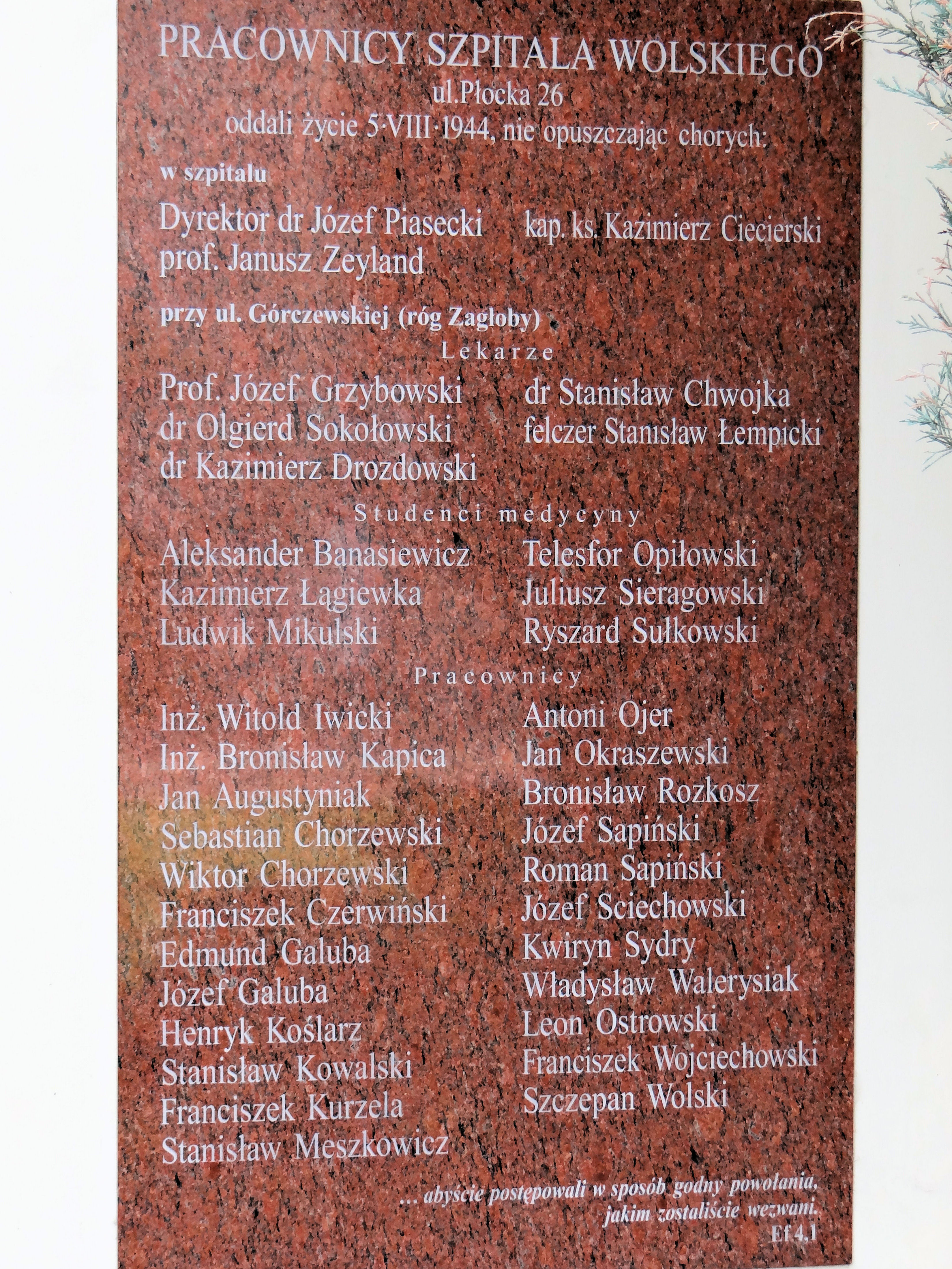 Kościół pod wezwaniem św Klemensa Hofbauera w Warszawie na Woli, przy ul. Karolkowej 49 - plac pamięci - tablica upamiętniająca ofiary II Wojny światowej pracowników Szpitala Wolskiego zamordowanych podczas pełnienia swych obowiązków zawodowych dnia 5 sierpnia 1944 r